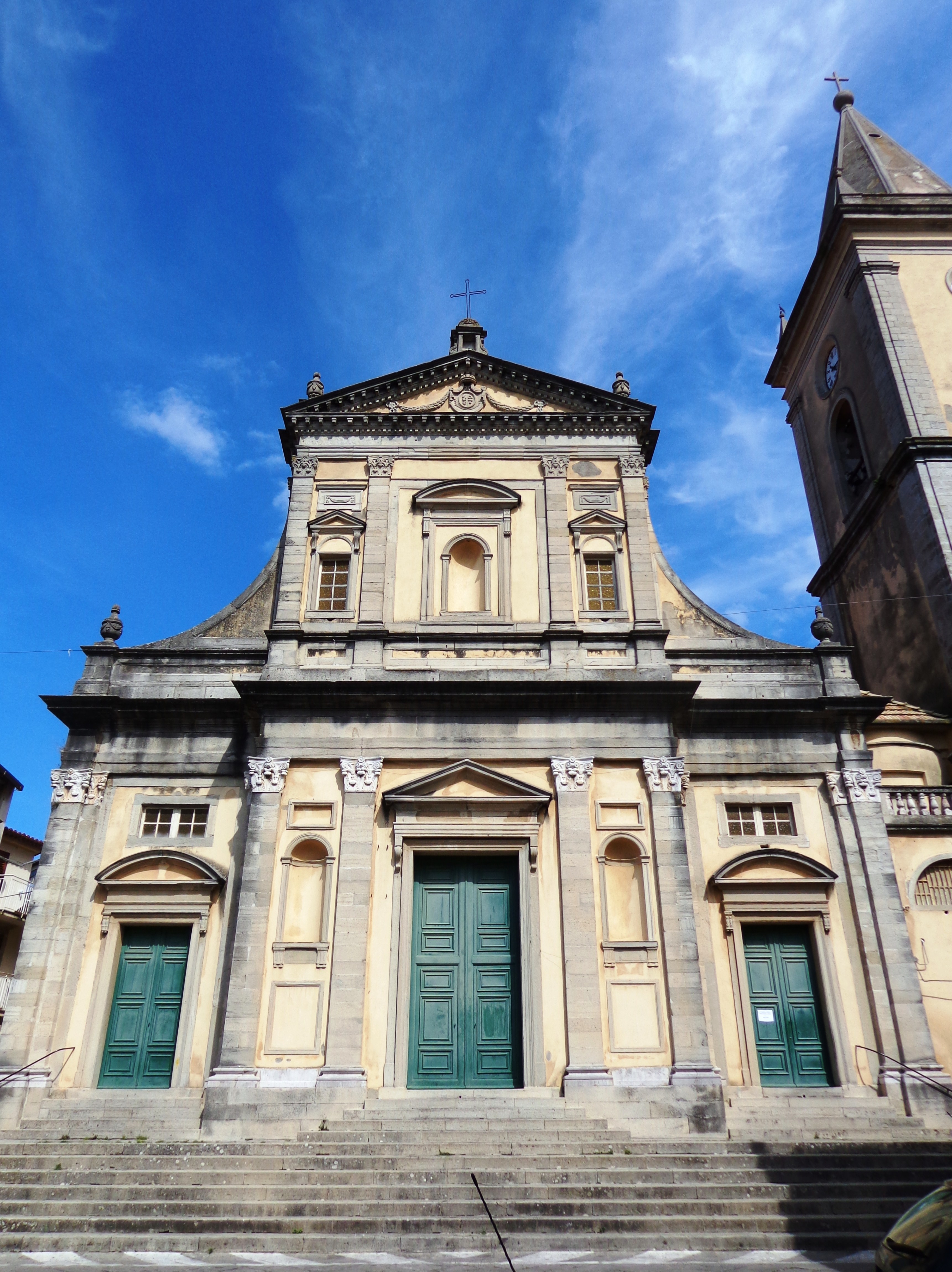 Duomo di Novara di Sicilia esterno